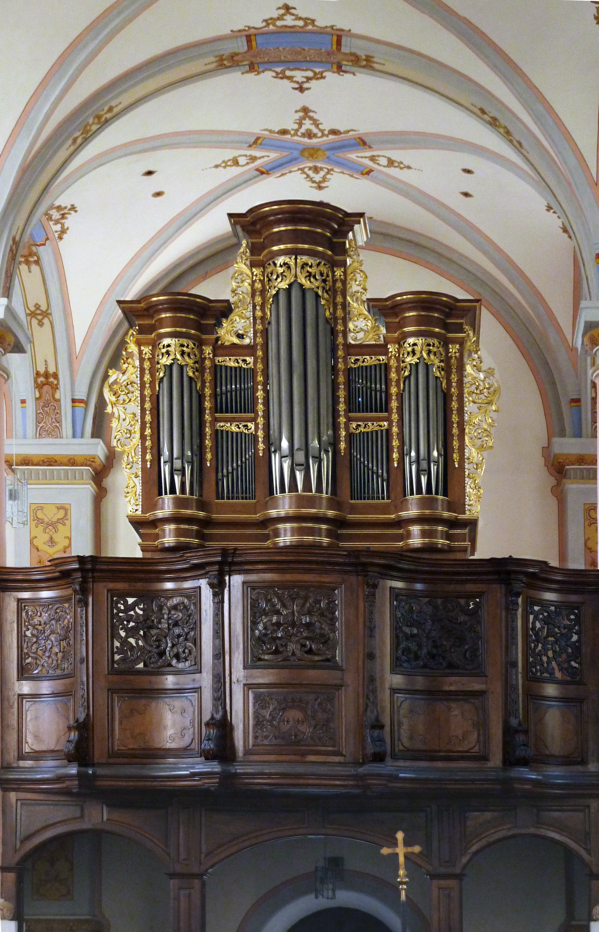 Katholische Pfarrkirche St. Josef, ehemalige Karmeliterkirche in Beilstein im Landkreis Cochem-Zell (Rheinland-Pfalz), Orgelempore, Orgel von Balthasar König, bezeichnet 1738